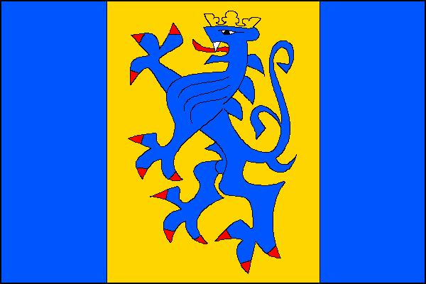 Vlajka obce Chvatěruby